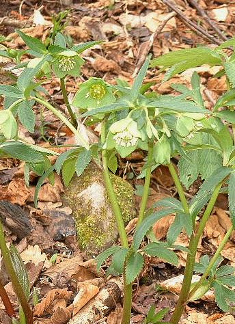 Hellébore vert, Boutx